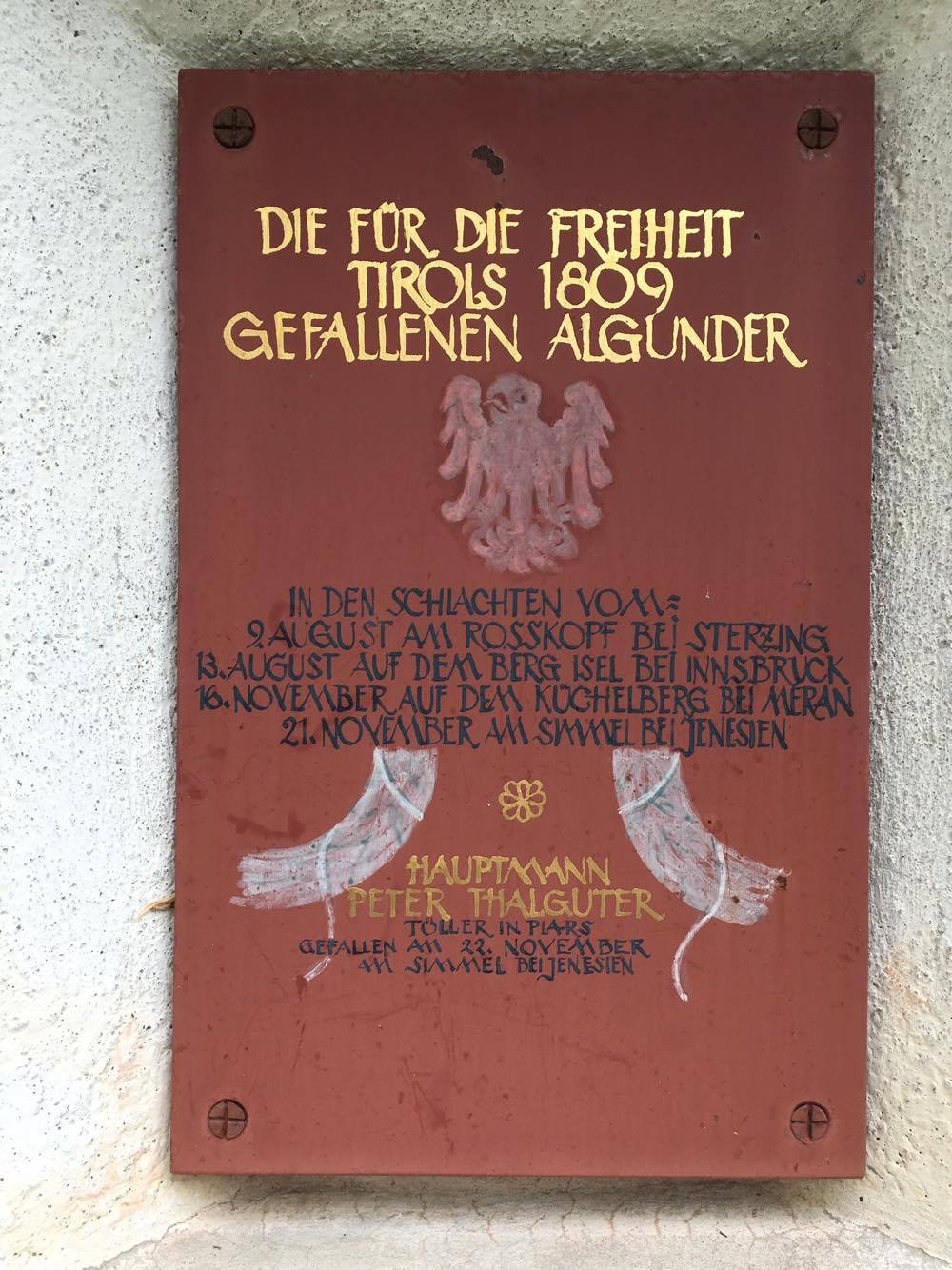 Die Gedenktafel an der Gedenkstätte von Peter Thalguter auf dem alten Friedhof in Algund.